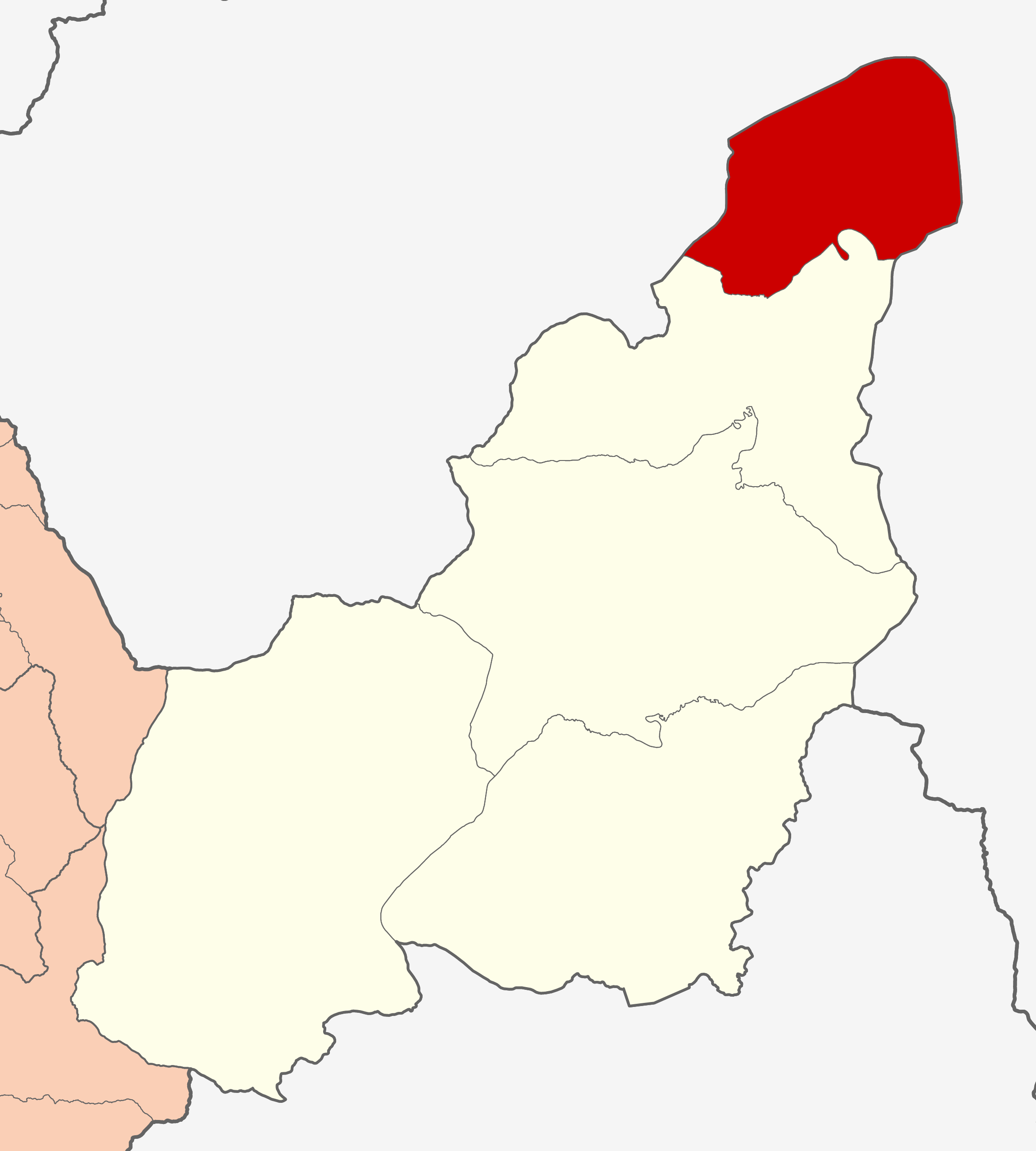 Área del distrito de Honoria.